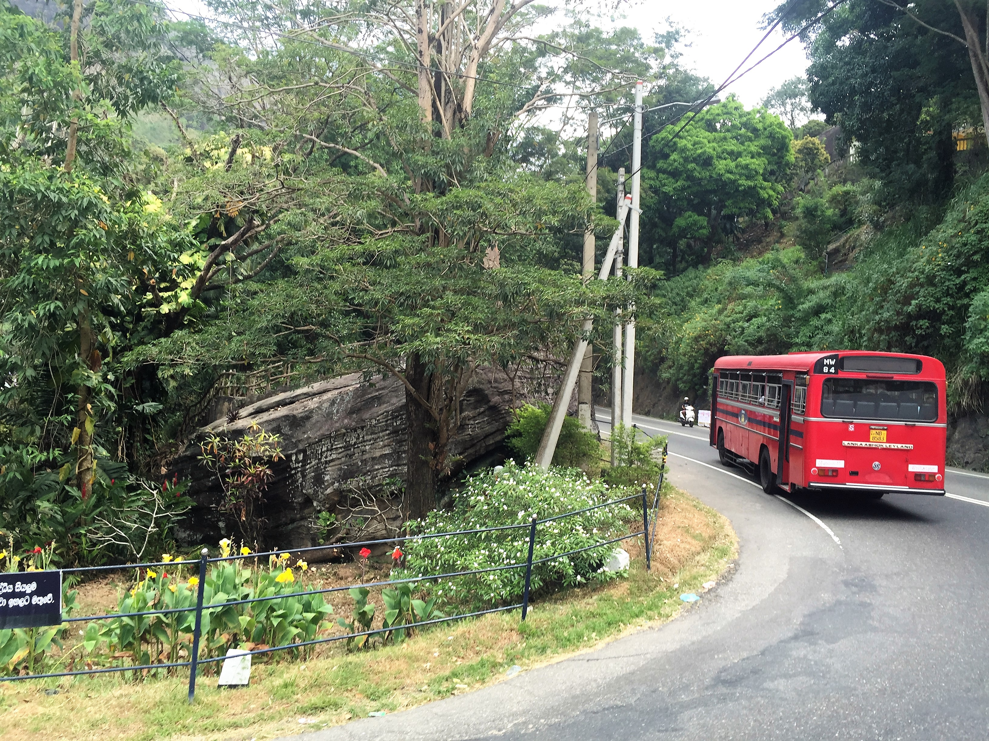 Kadugannawa, Sri Lanka